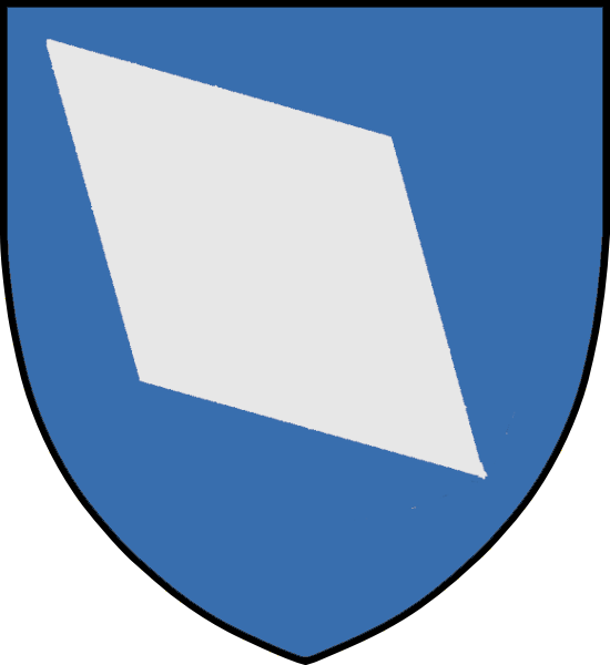 Vapensköld för danska adelsätten Rud